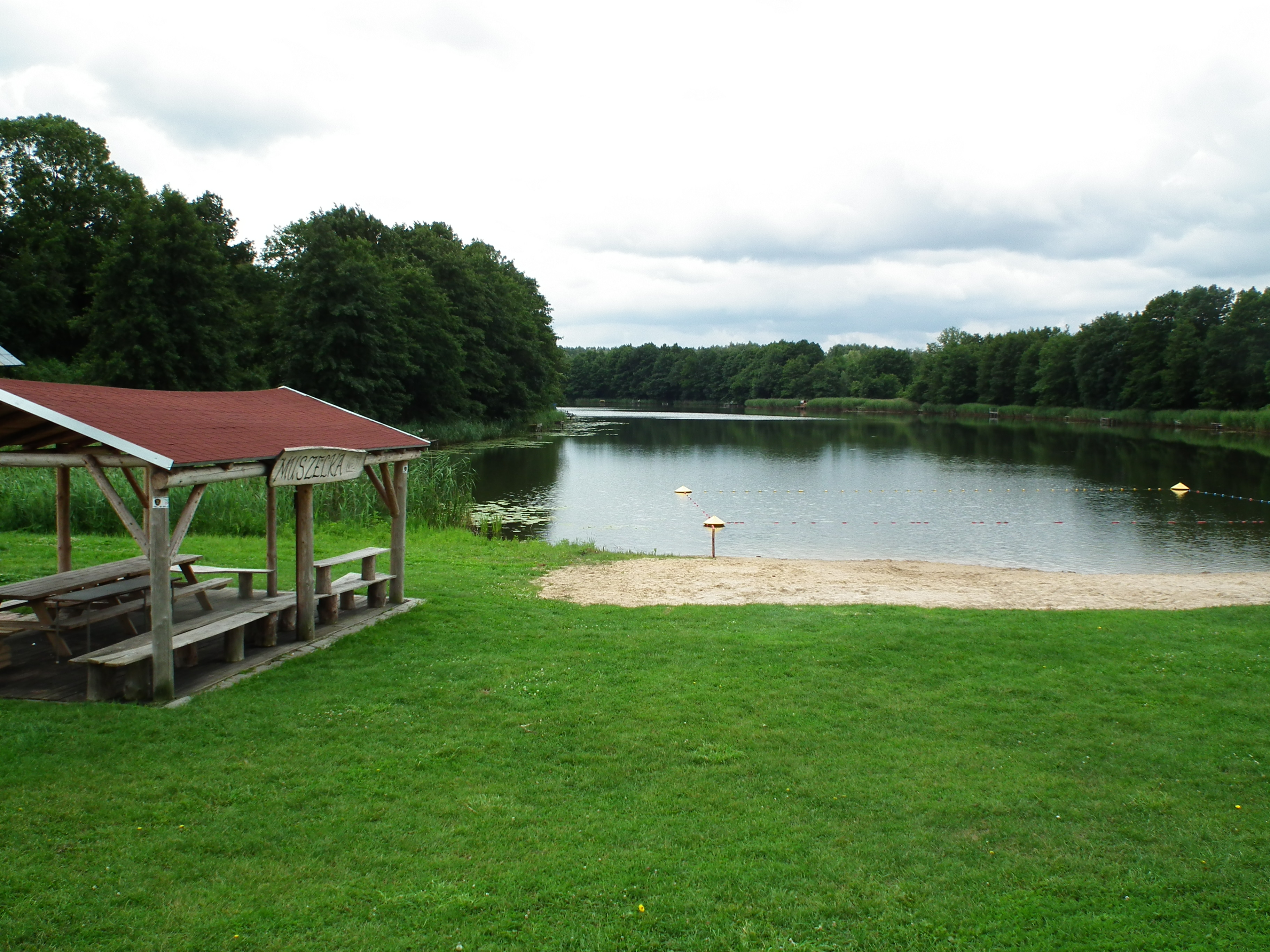 Wieś Nienawiszcz. Jezioro Nienawiszcz Duża - plaża.